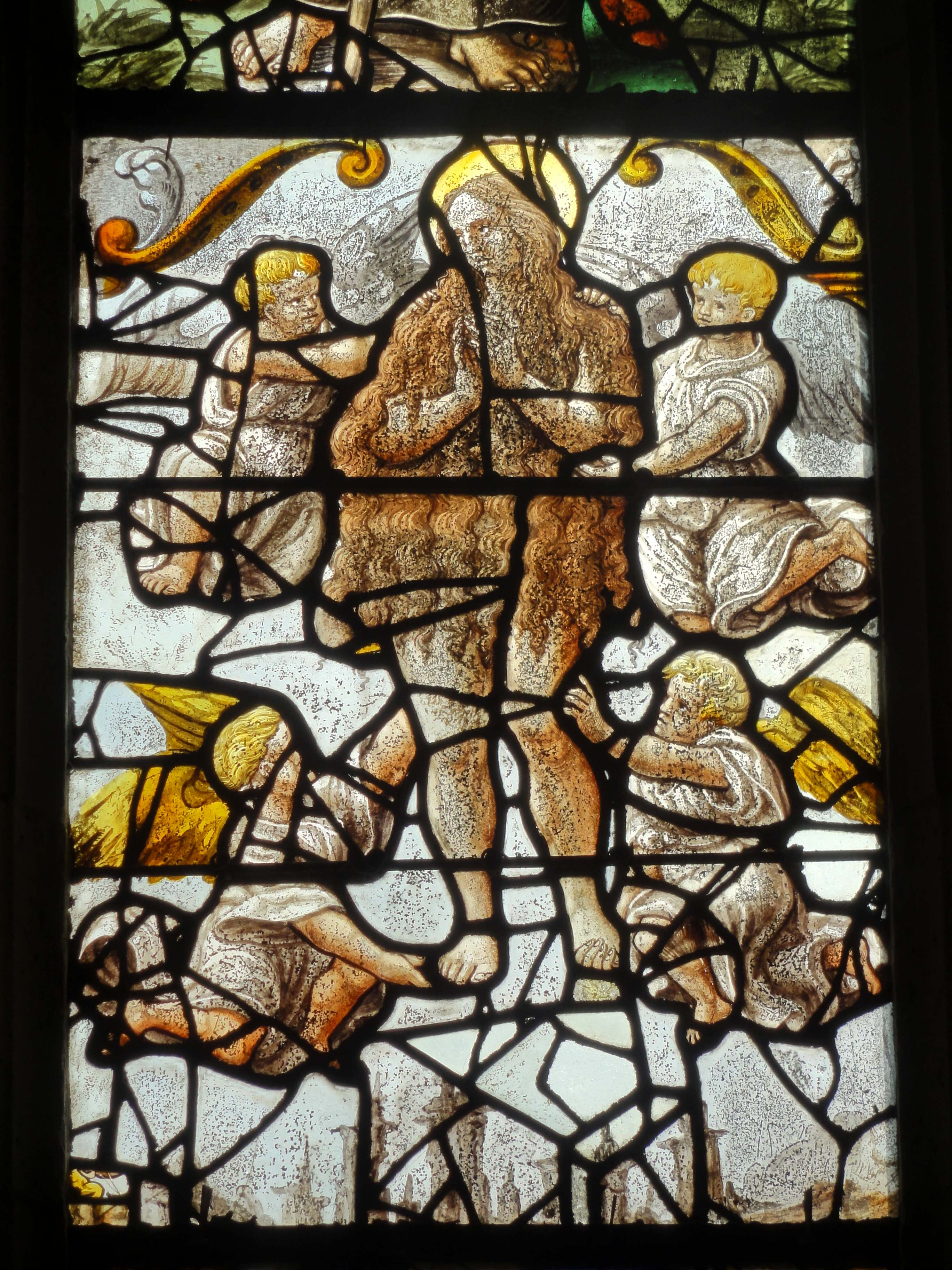 Verrière n° 4 - voir titre.